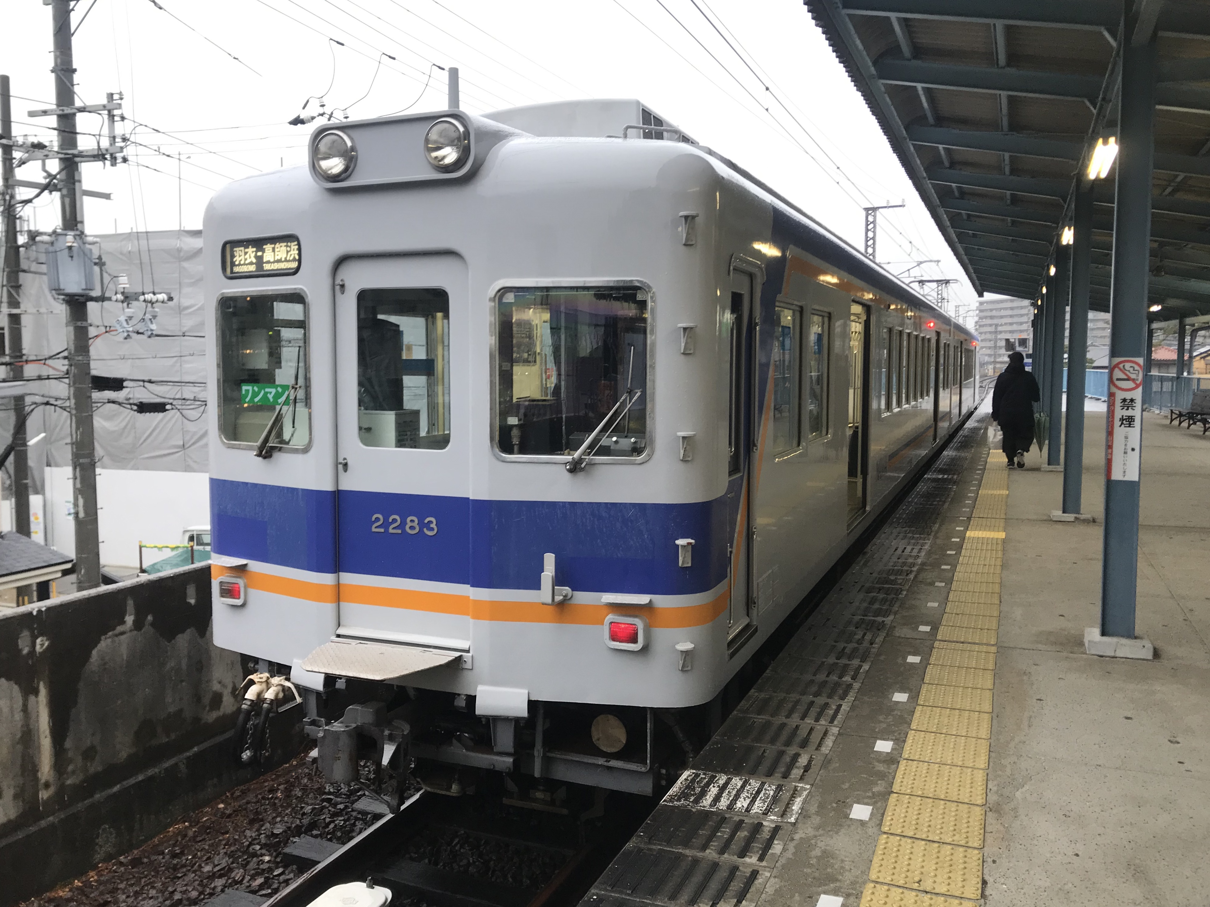 高師浜駅に停車中の高師浜線列車